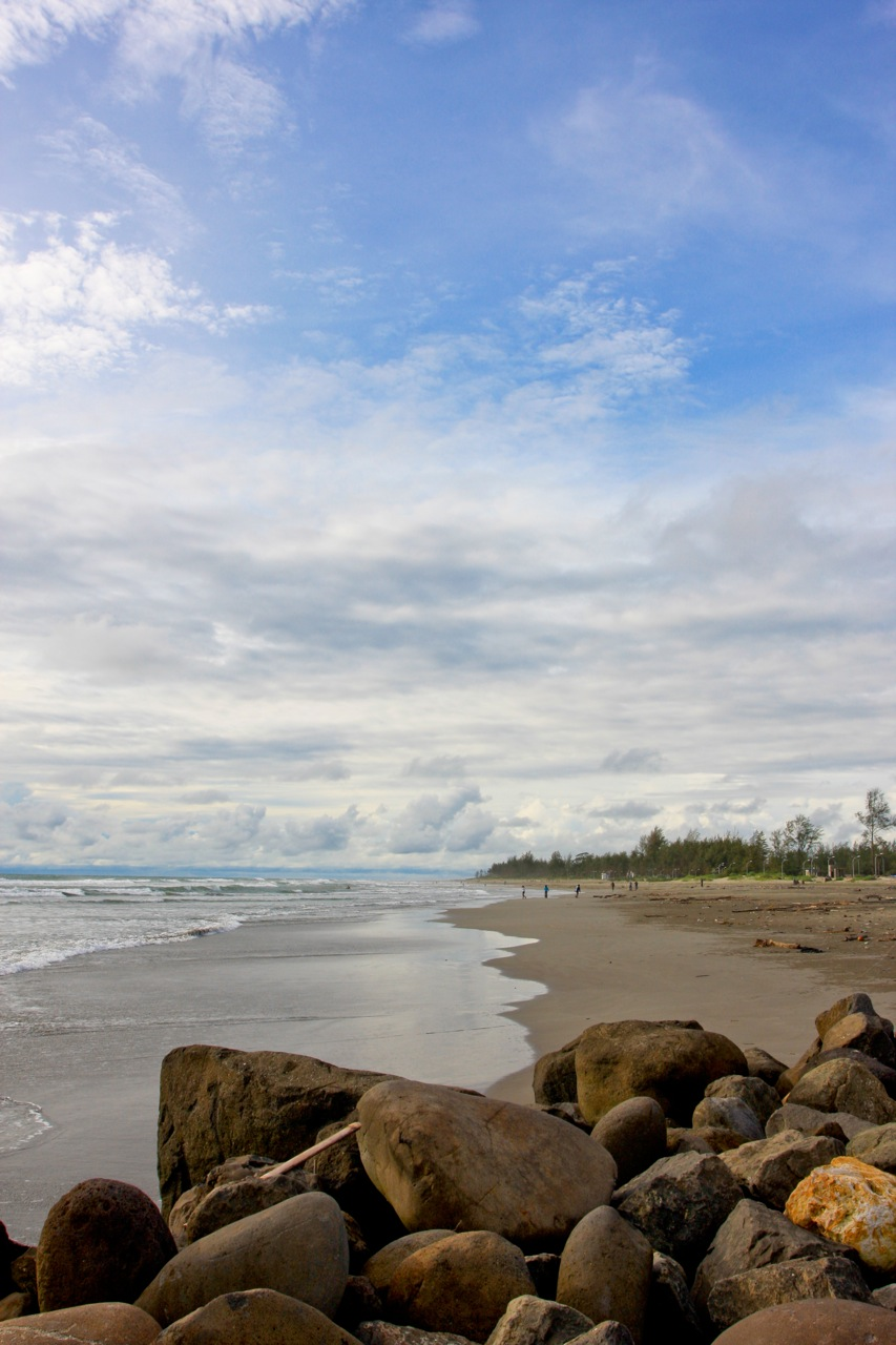 Pantai Panjang (Long Beach), Bengkulu.